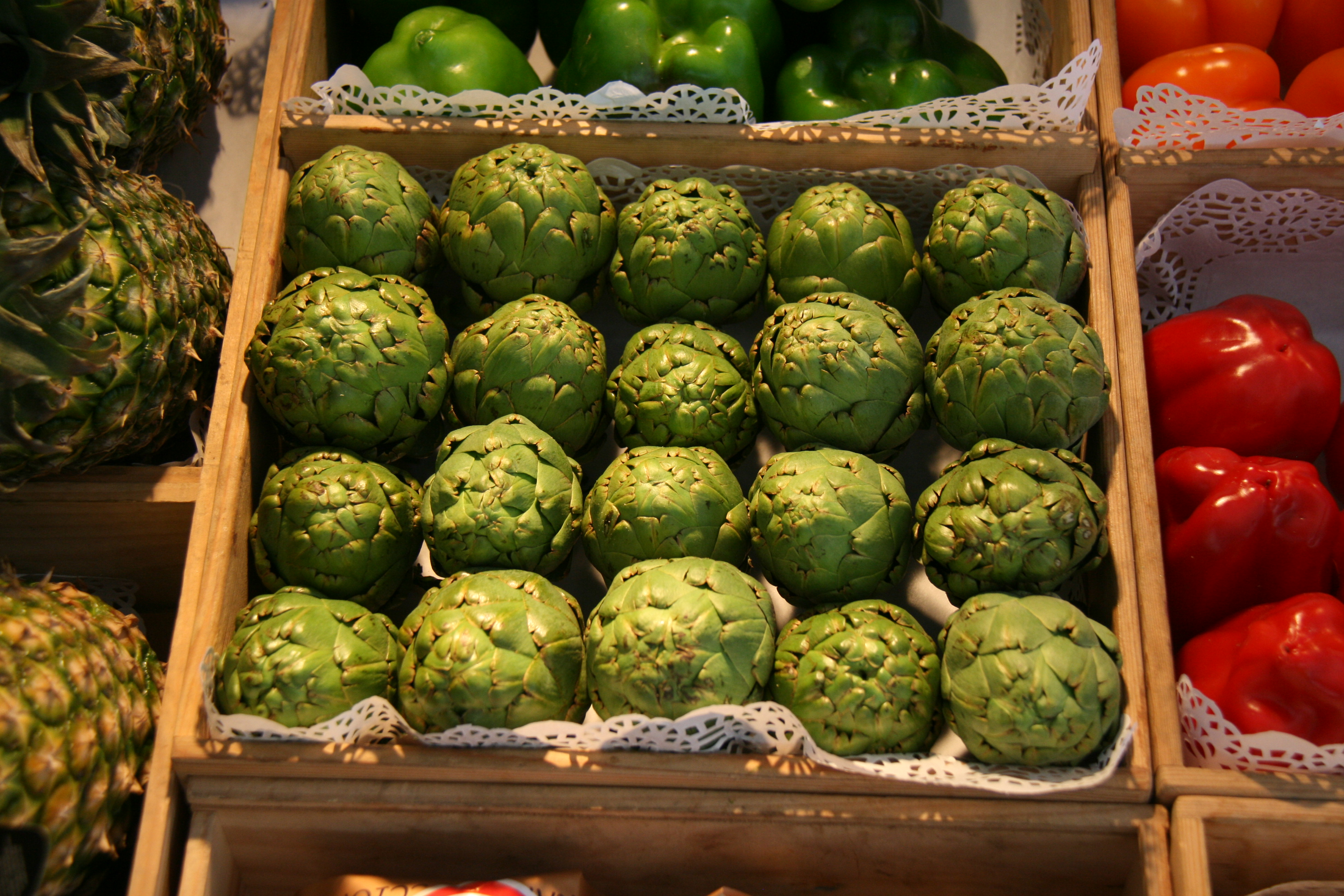 Artischocken